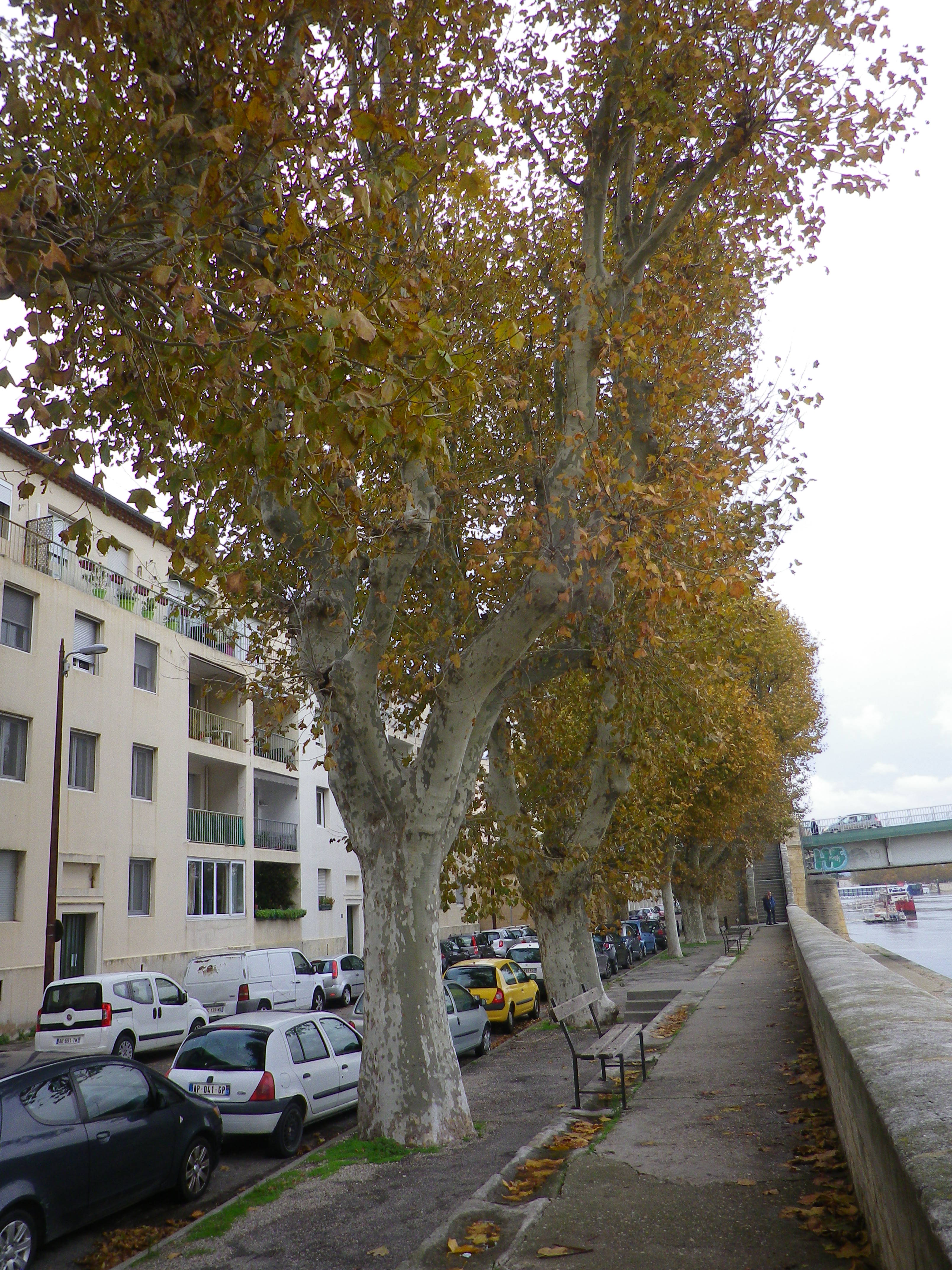 Platane commun en automne à Arles (13)